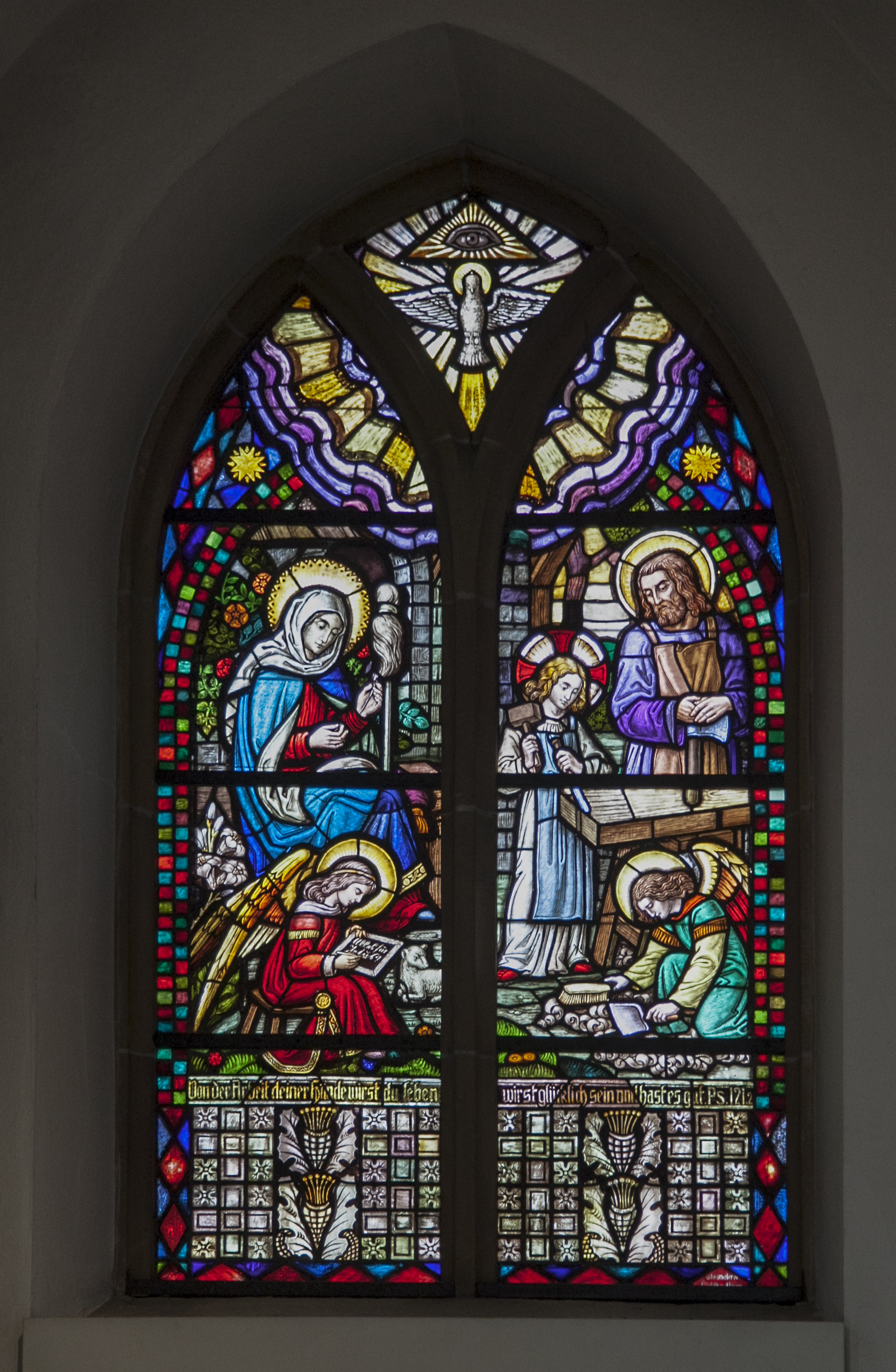 Elte, St. Ludgerus, Chorfenster 2